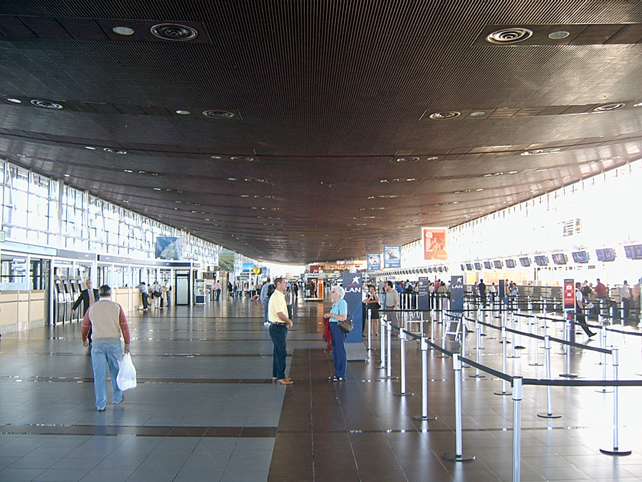 Terminal am Flughafen von Santiago de Chile